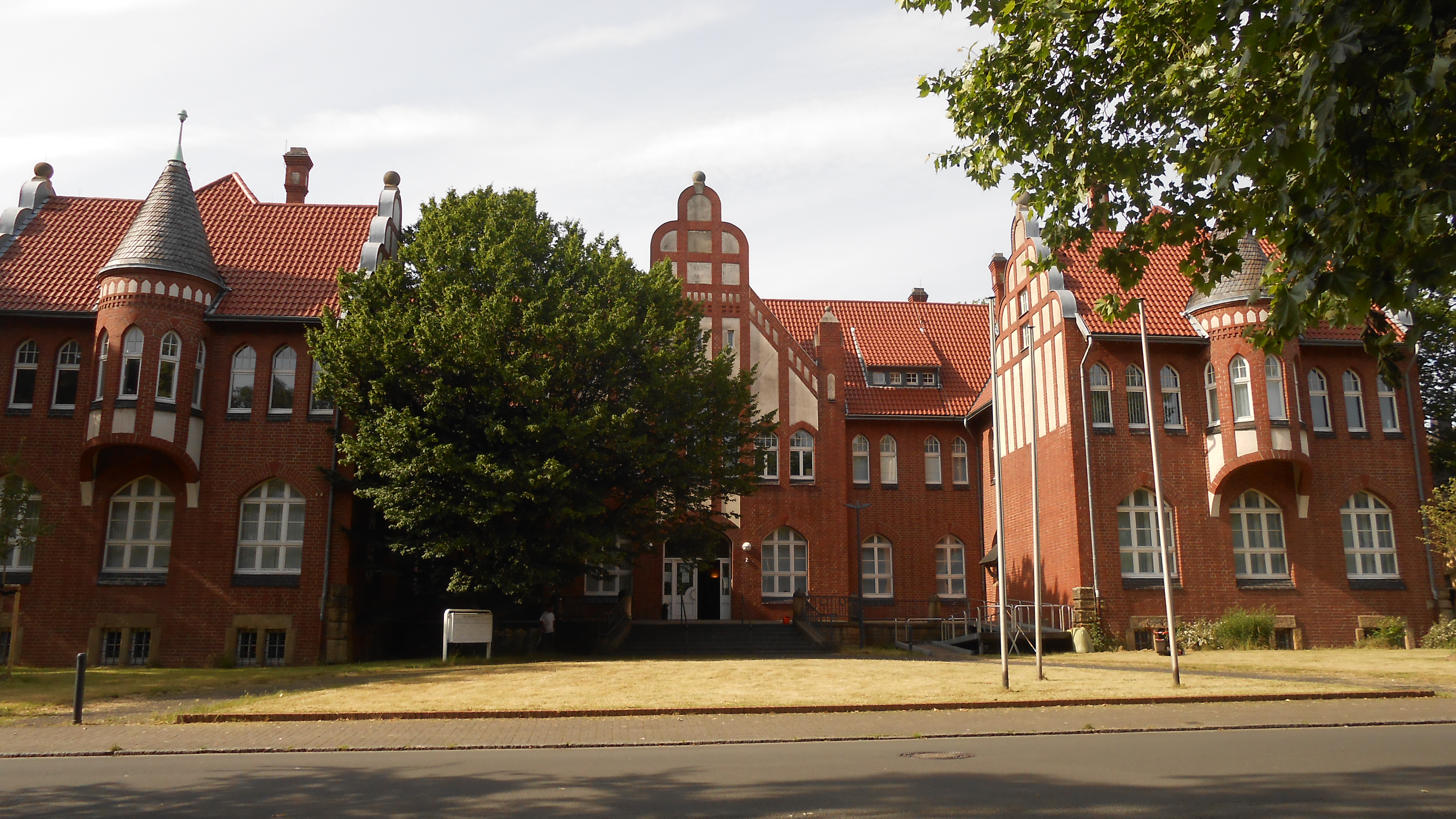 Das ehemalige Wohlfahrtsgebäude Alte Kolonie in Dortmund-Eving.